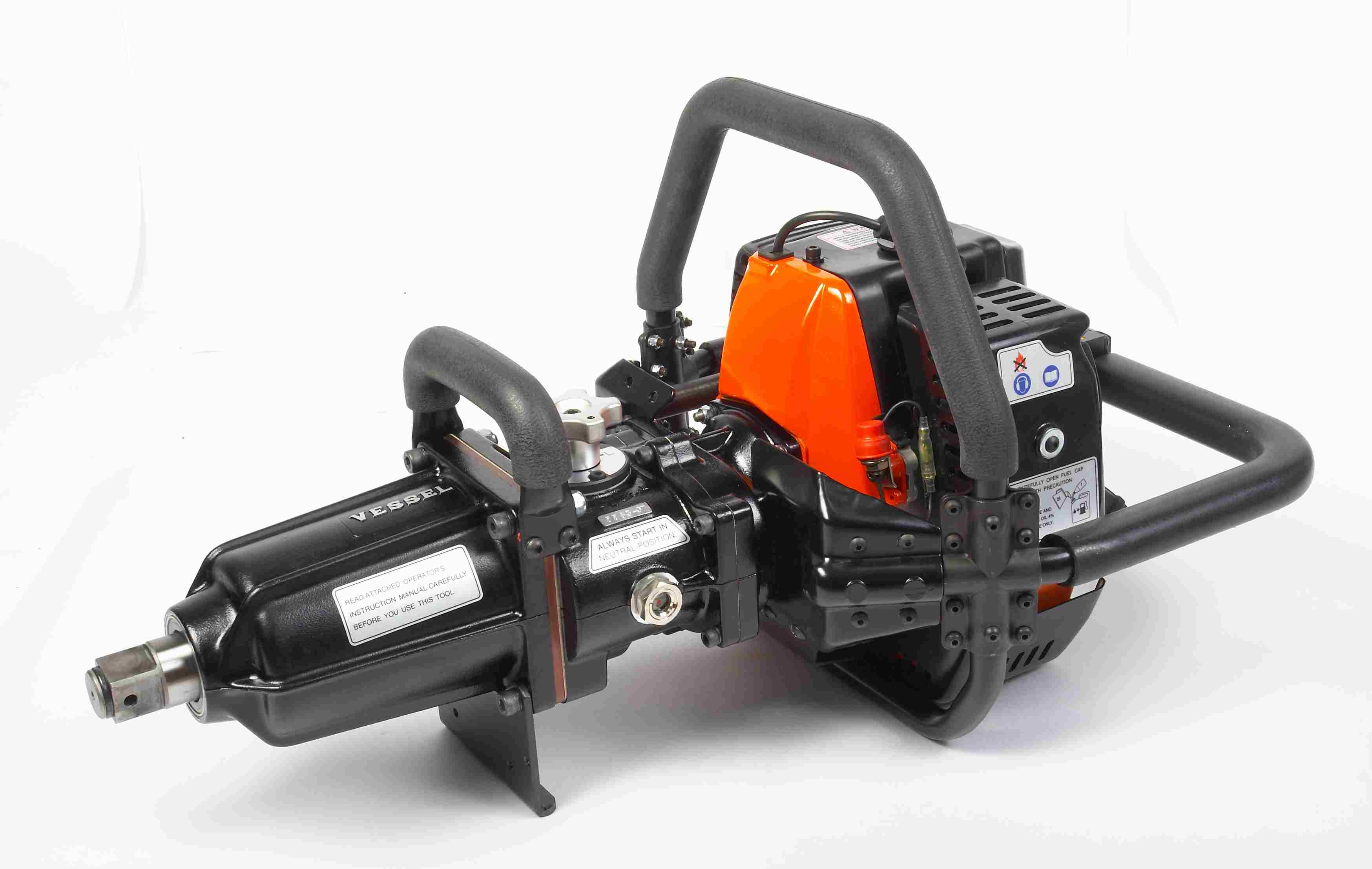 Бензогайковерт, гайковерт с бензиновым двигателем, мотогайковерт